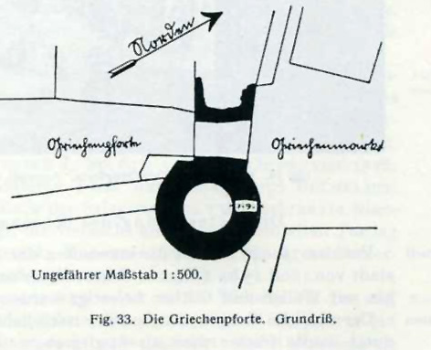 Kölner Stadtmaueer, Grundriss der Griechenpforte.